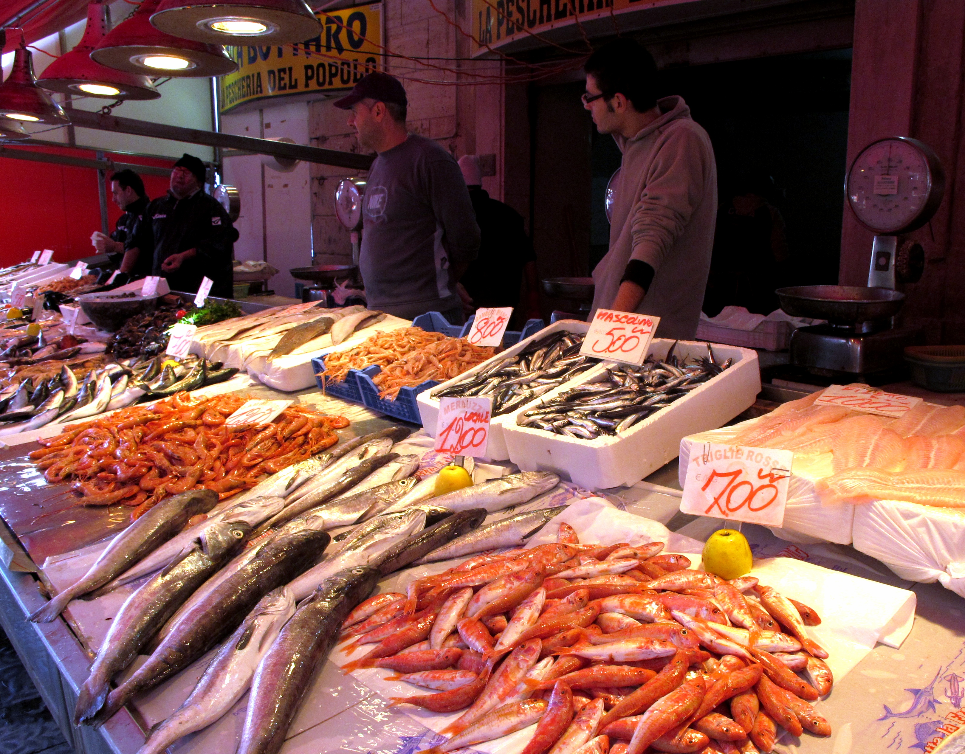 Pescheria ad Ortigia